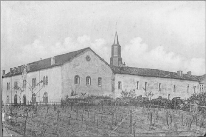 L'abbaye de Divielle, Goos (Landes) vers 1930 (d'après une carte postale d'époque)